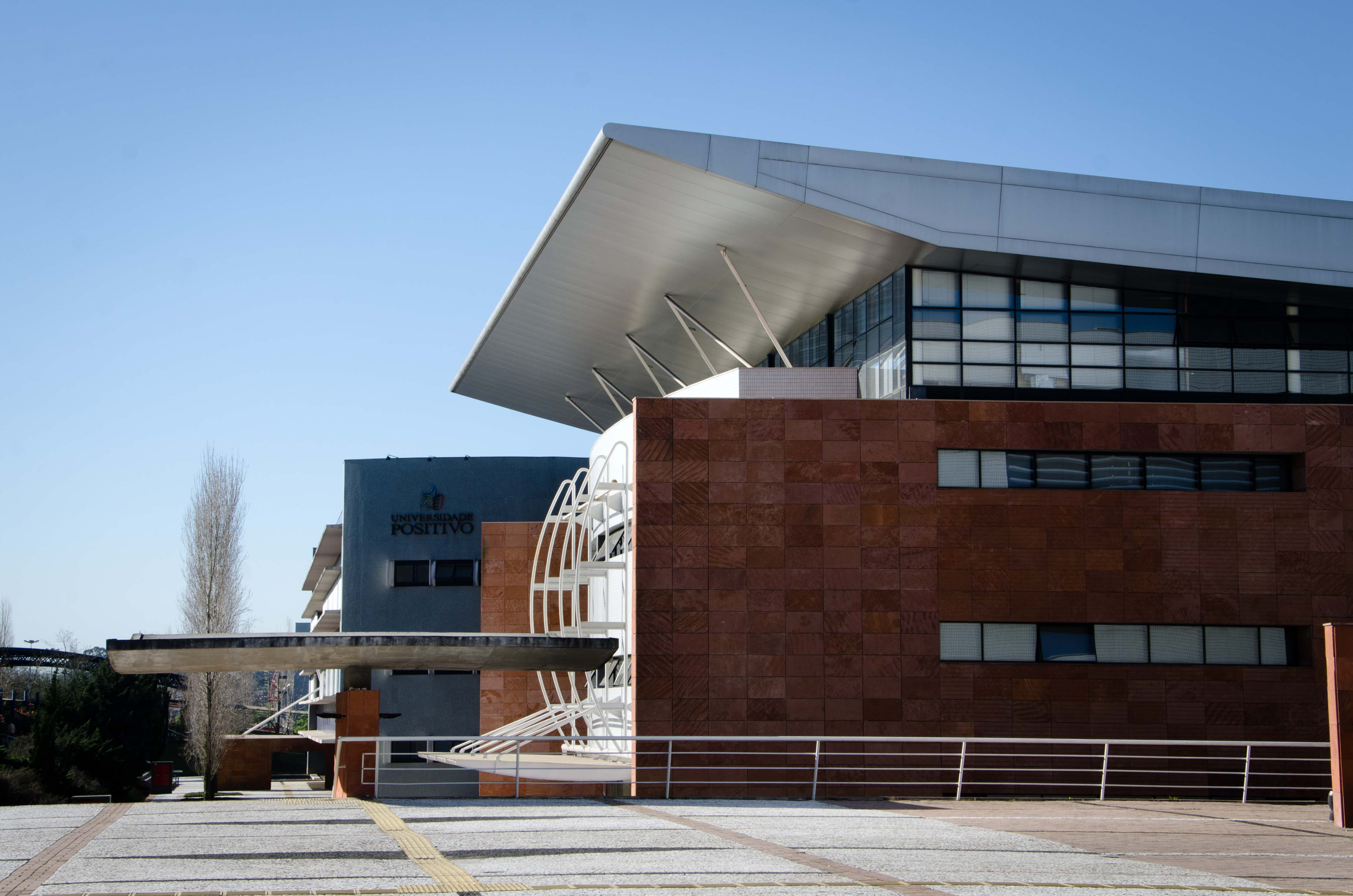 Biblioteca da Universidade Positivo